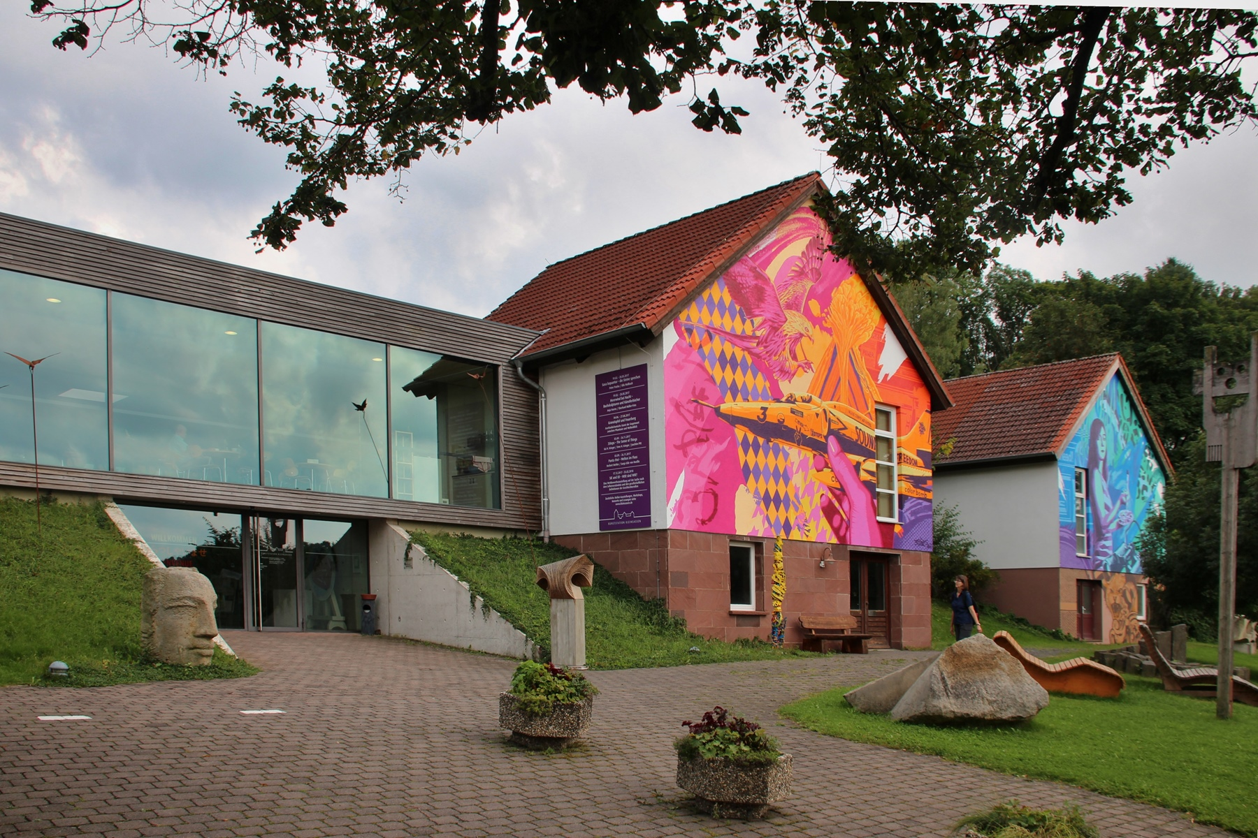 Kunststation (Museum, Café und Artothek) Kleinsassen in Hofbieber-Kleinsassen (Rhön)